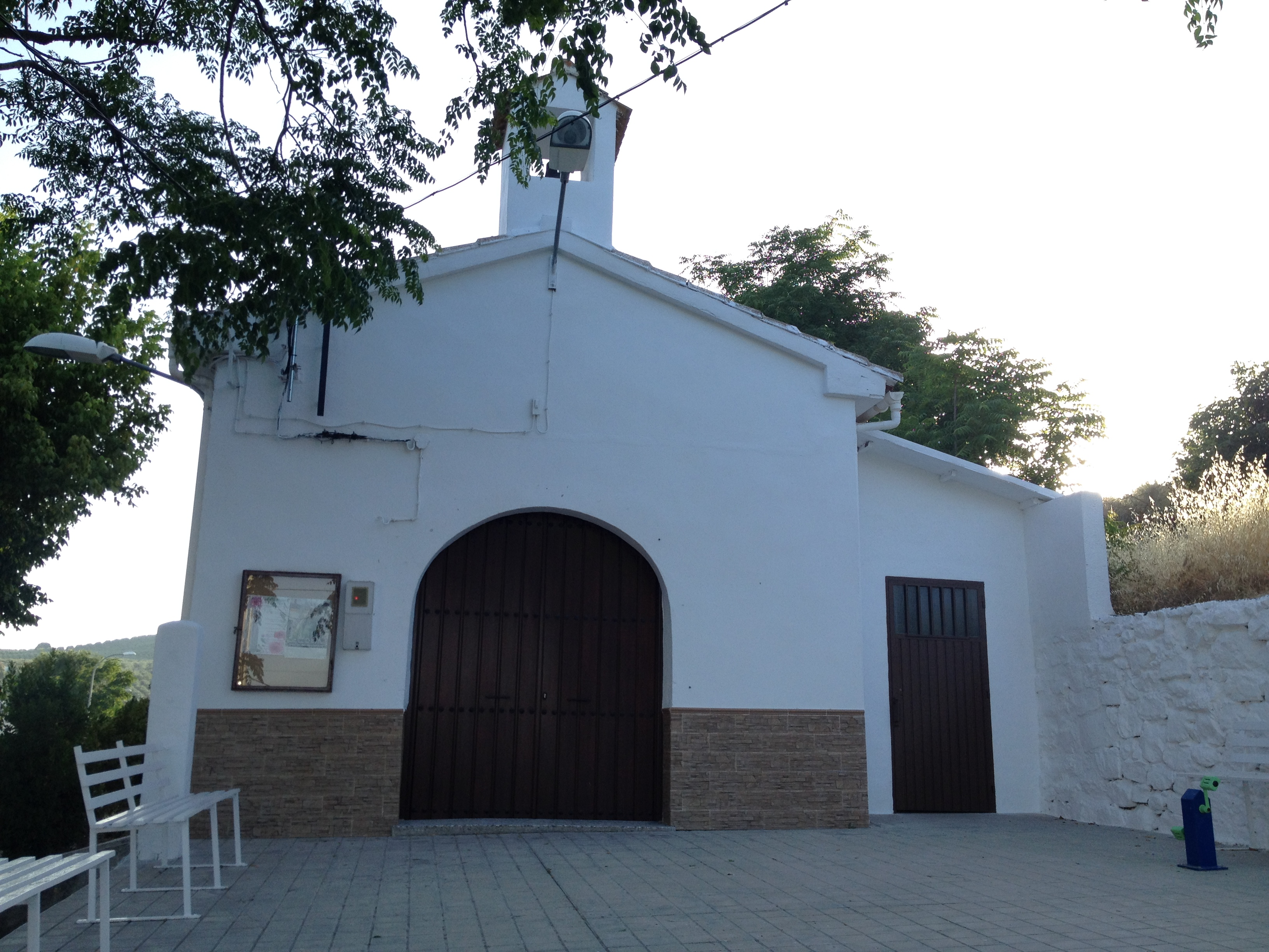 Fotografía de la iglesia de Venta de Agramaderos (Jaén).